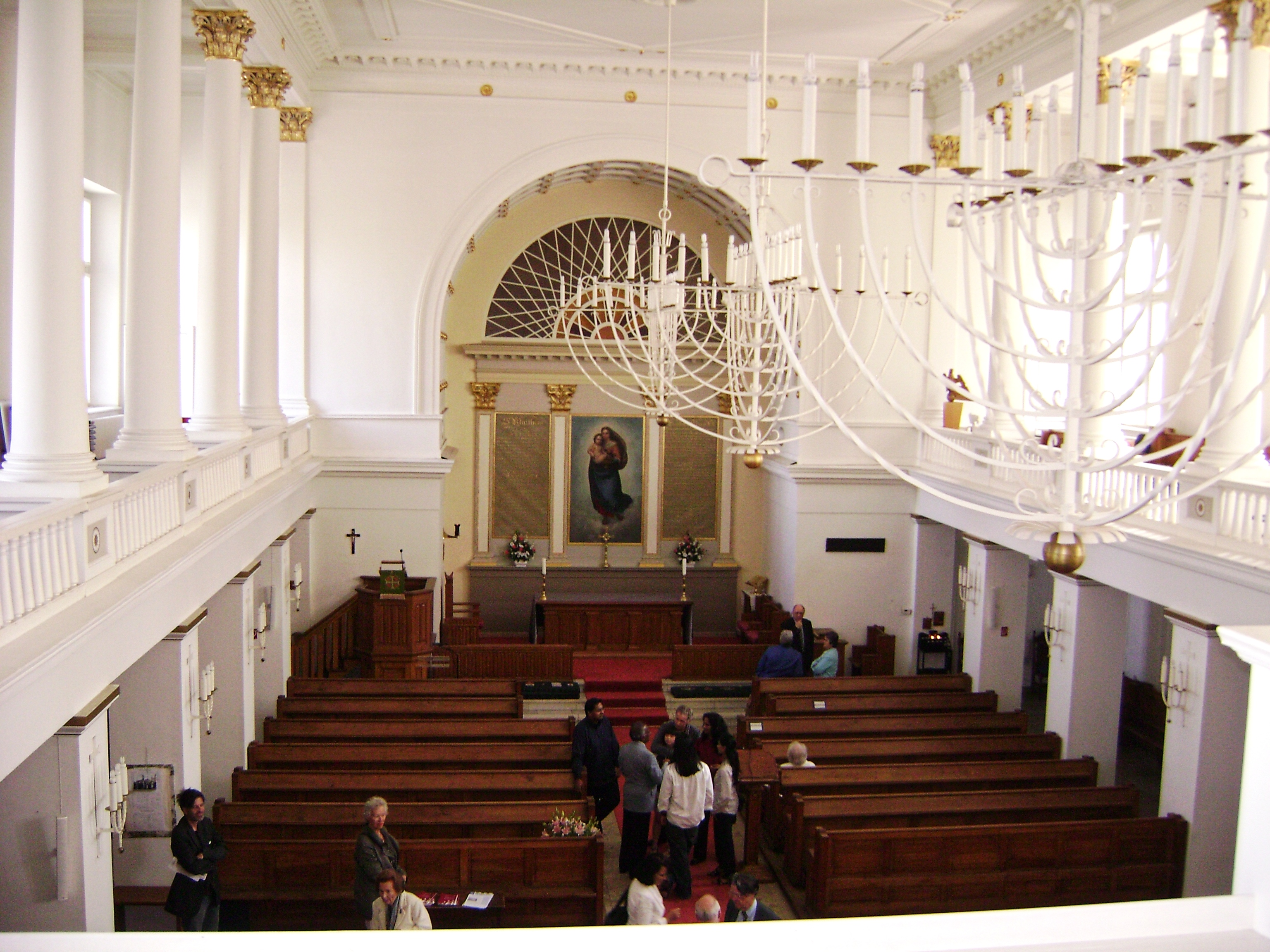 Englisch Kirche von Innen